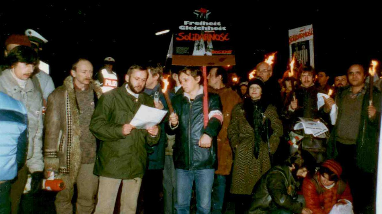 Demostracja pod Ambasadą PRL-u 13.12.1983 r., od lewej: Alexander Zając, Wojciech Drozdek, Andrzej Wirga.